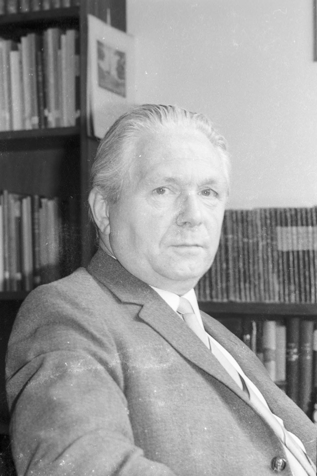 Der Ordinarius für deutsche, insbesondere niederdeutsche Philologie und Niederländisch wird 60 Jahre alt.